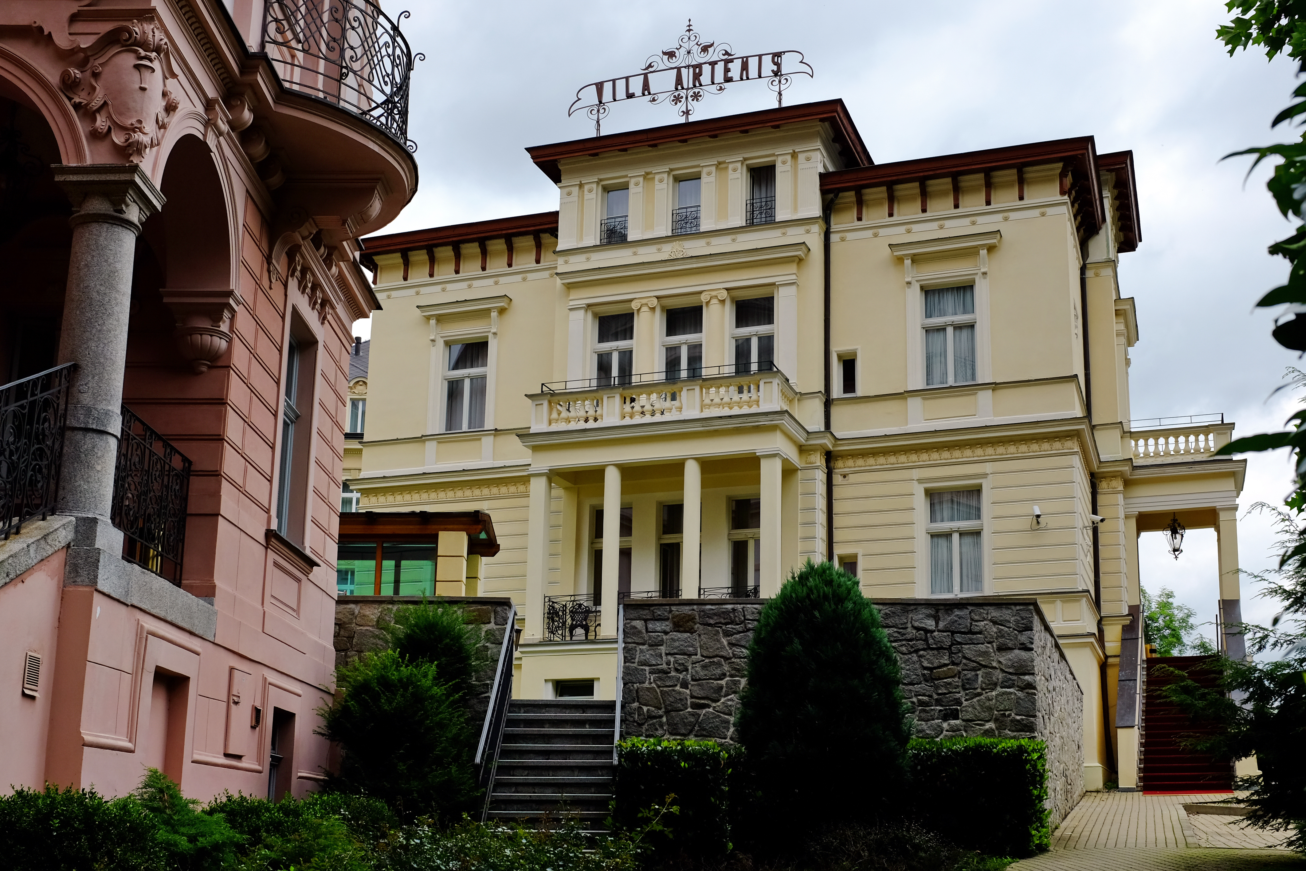 Vila Artemis, Petra Velikého 853/8, Karlovy Vary.